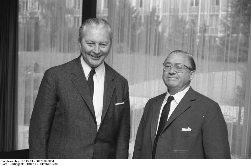 Bundeskanzler Kiesinger empfängt MdB Dr. Menne (FDP)